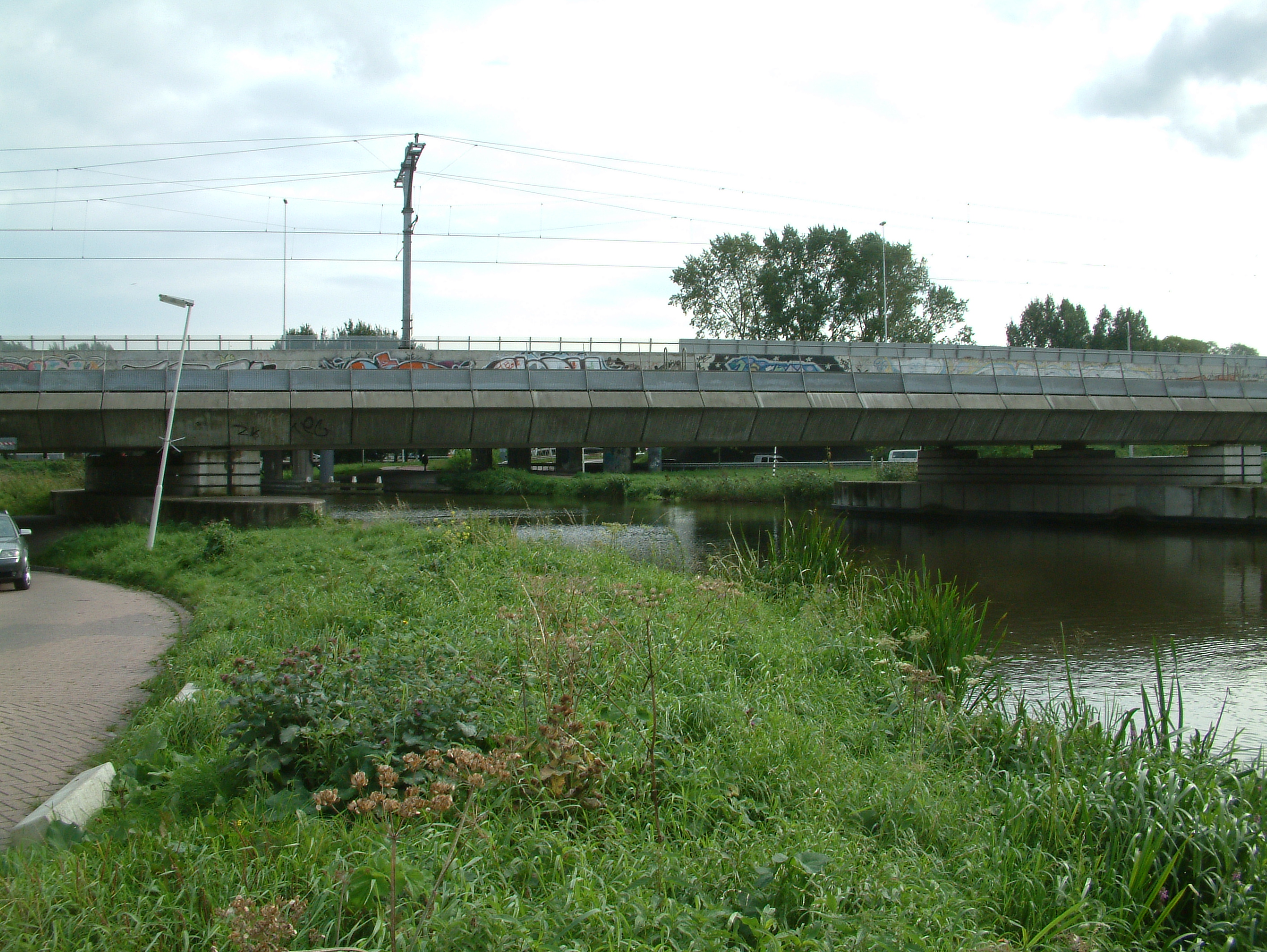 De spoorbrug naast de A20 over de Rotte